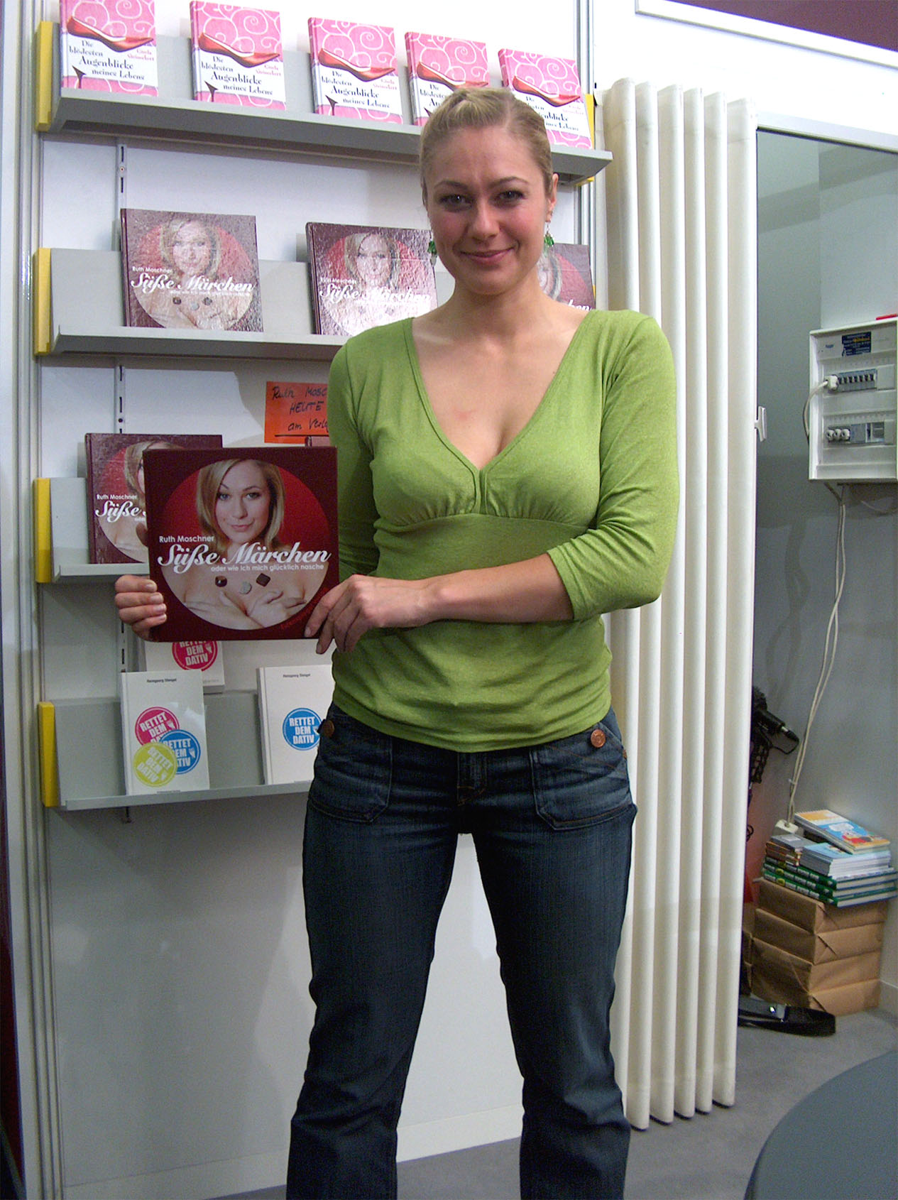 Ruth Moschner bei der Präsentation ihres Pralinenrezeptbuches "Süße Märchen" auf der Frankfurter Buchmesse 2006 am 07.10.2006